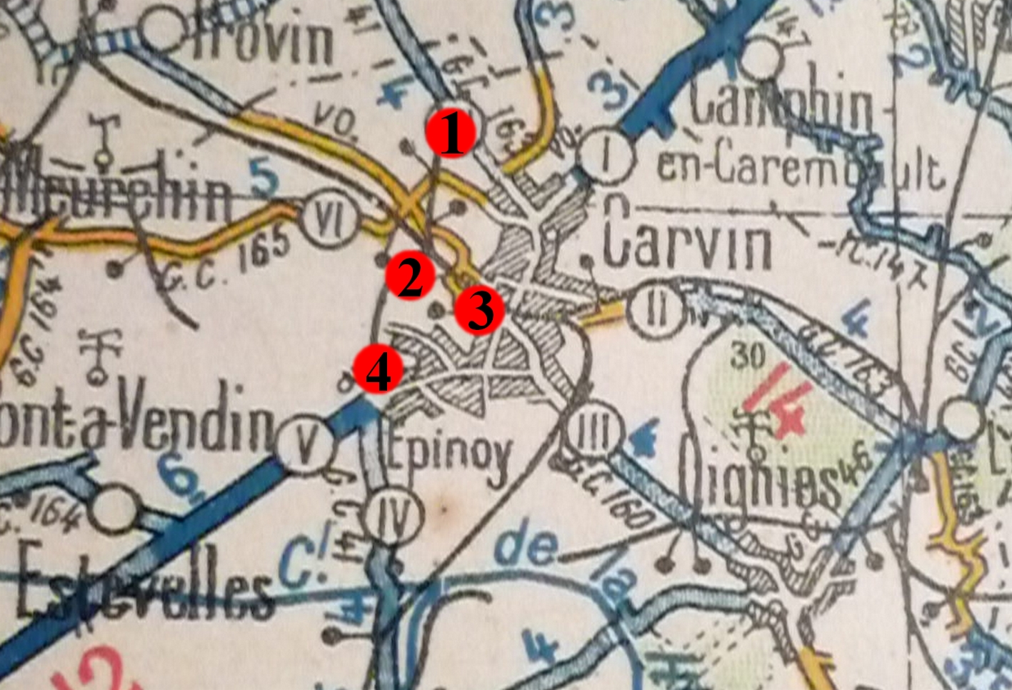 Cette carte présente les voies ferrées et les puits de mine de la Compagnie des mines de Carvin vers 1920.